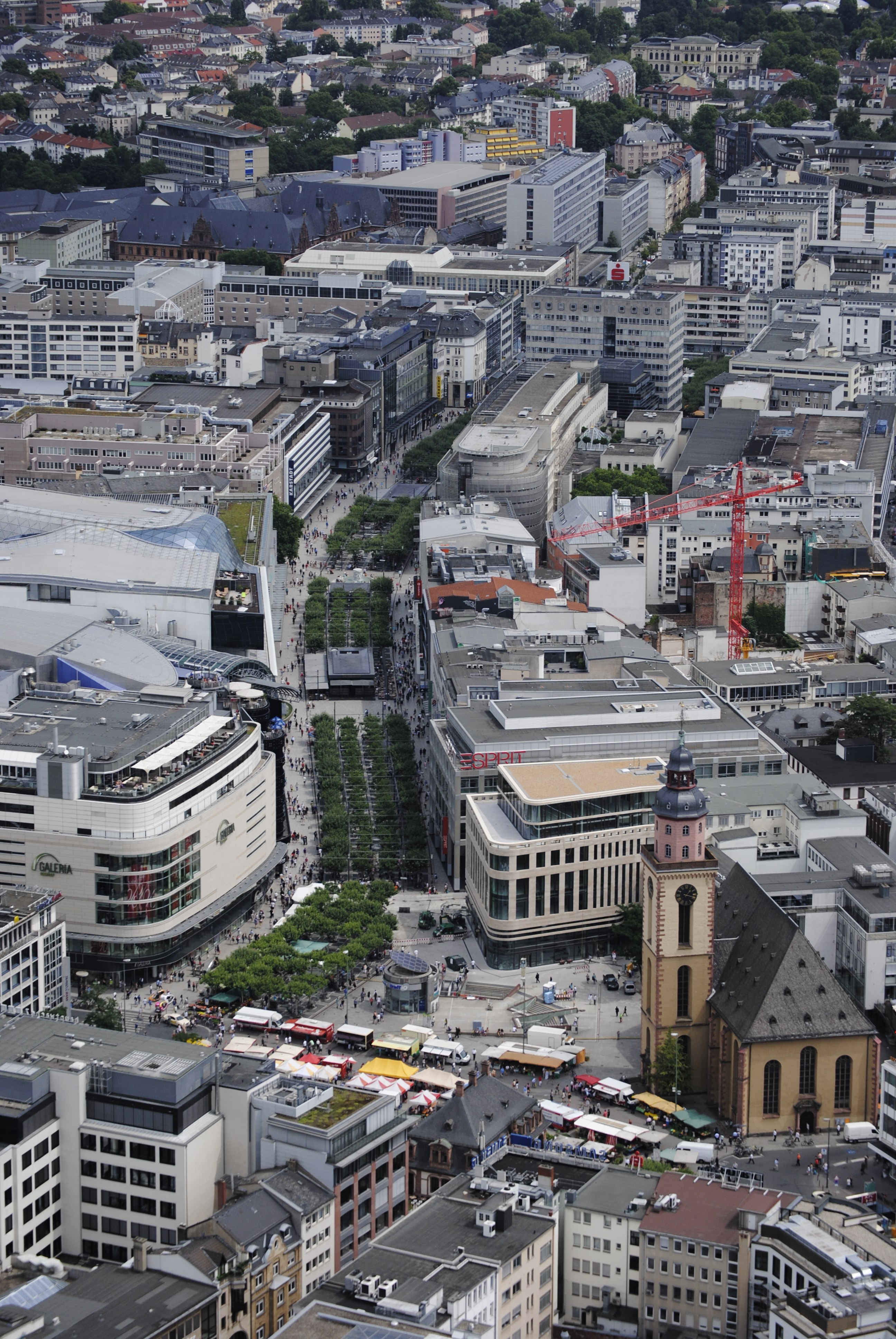 Die Zeil, gesehen vom Maintower